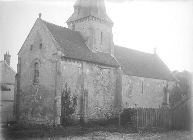 Vue depuis le nord-est en 1920 ou avant.